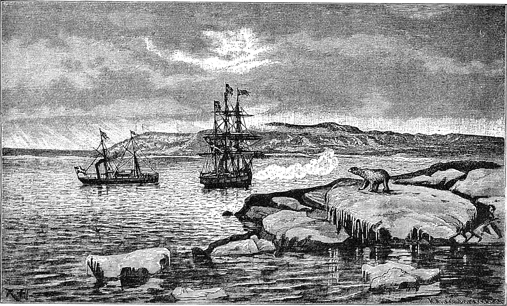 Иллюстрация из книги И. Н. Березина Ледяной плен.